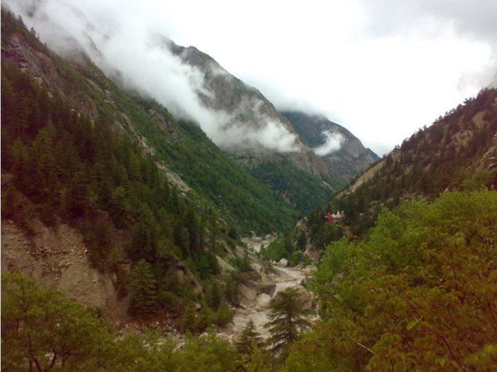 Gomukha gangotri